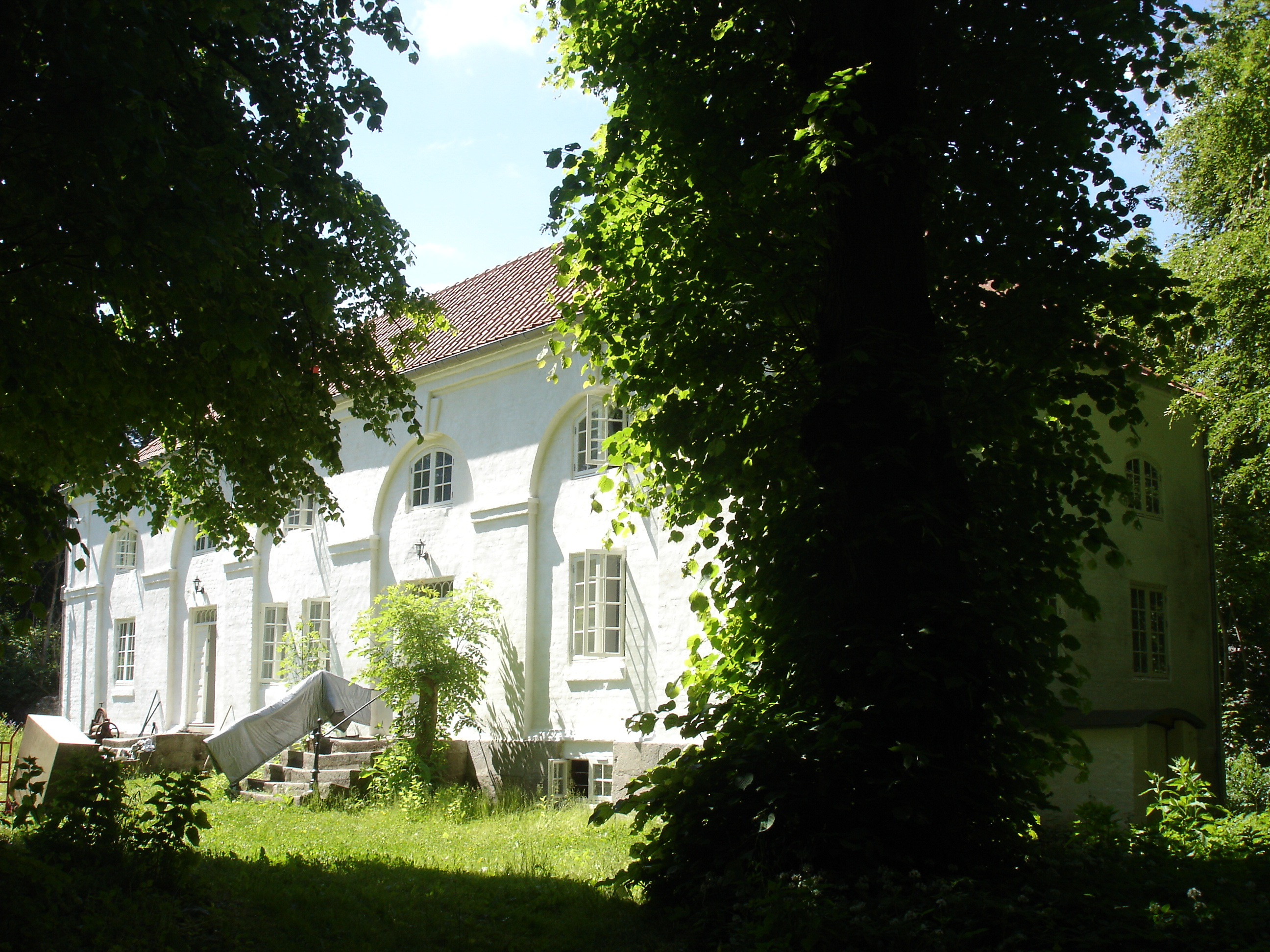 Nøragergård i Nørager